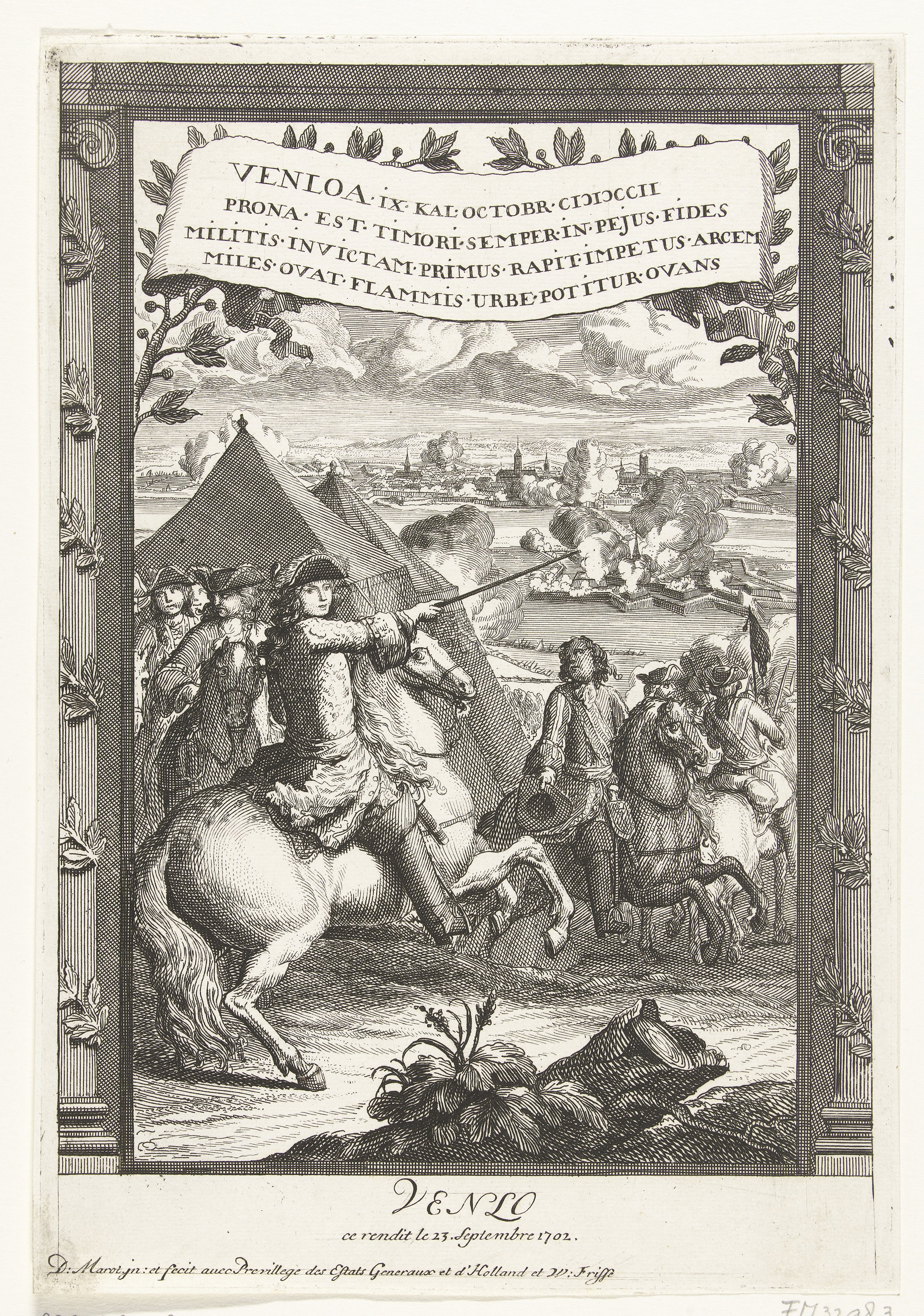 Paneel met een voorstelling van de overwinningen te Venlo op 23 september 1702